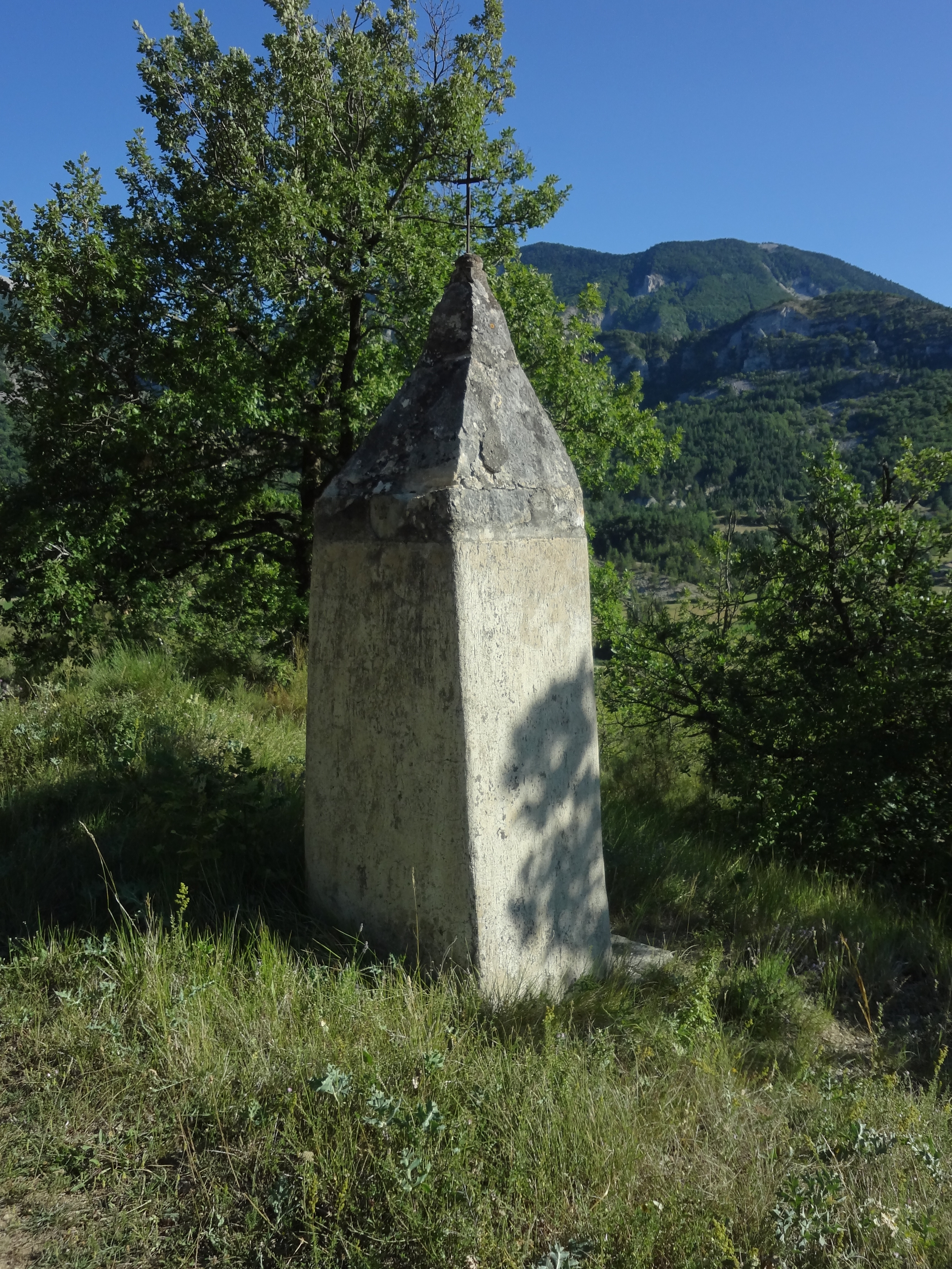 oratoire Saint-Sébastien de Châteauneuf-Miravail (vieux village)